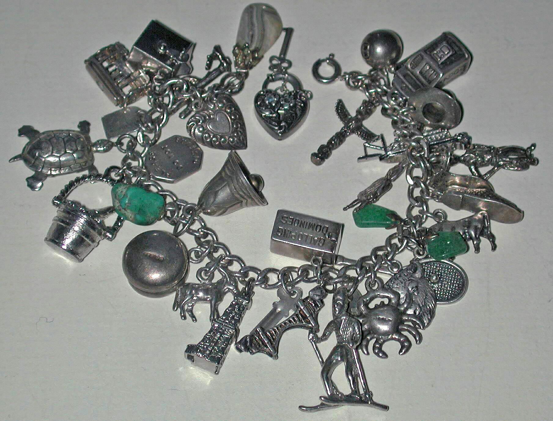 Bettelarmband -eigene Aufnahme